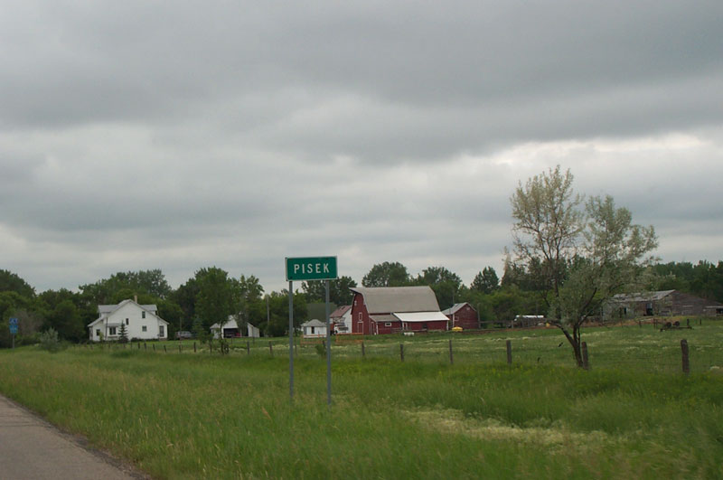 Pisek, North Dakota. From .Pisek, North Dakota